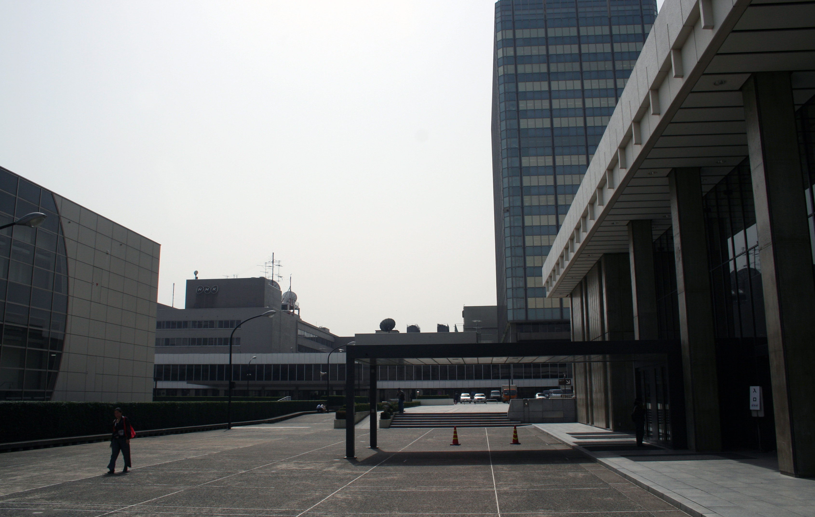 NHK / NHK Studiopark Tōkyō-to Shibuya-ku Kamiyama-chō 4-14 東京都渋谷区神山町 4-14